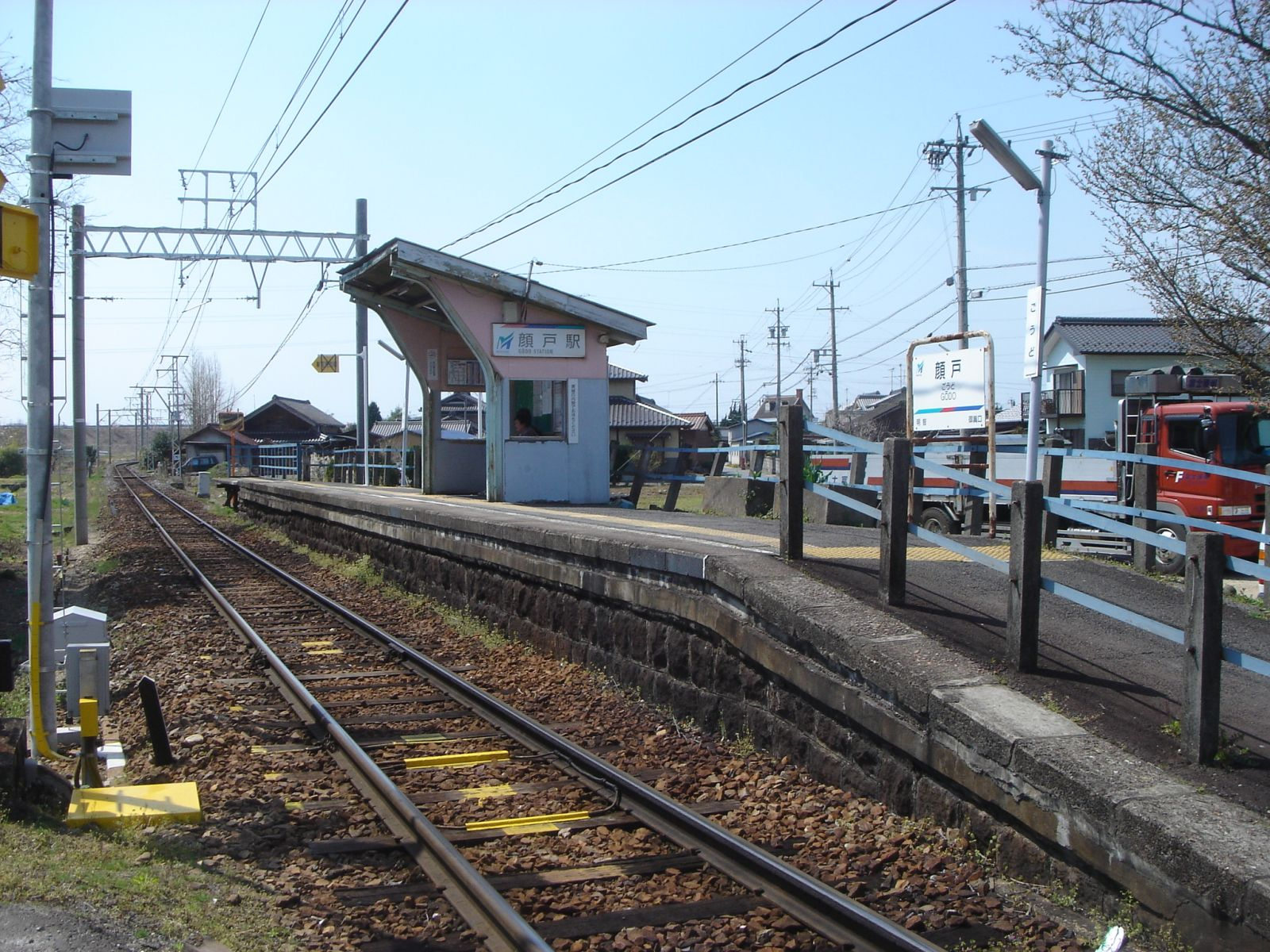 Godo Station (名鉄広見線、顔戸駅）,Mitake,Gifu,Japan(岐阜県御嵩町)で撮影。